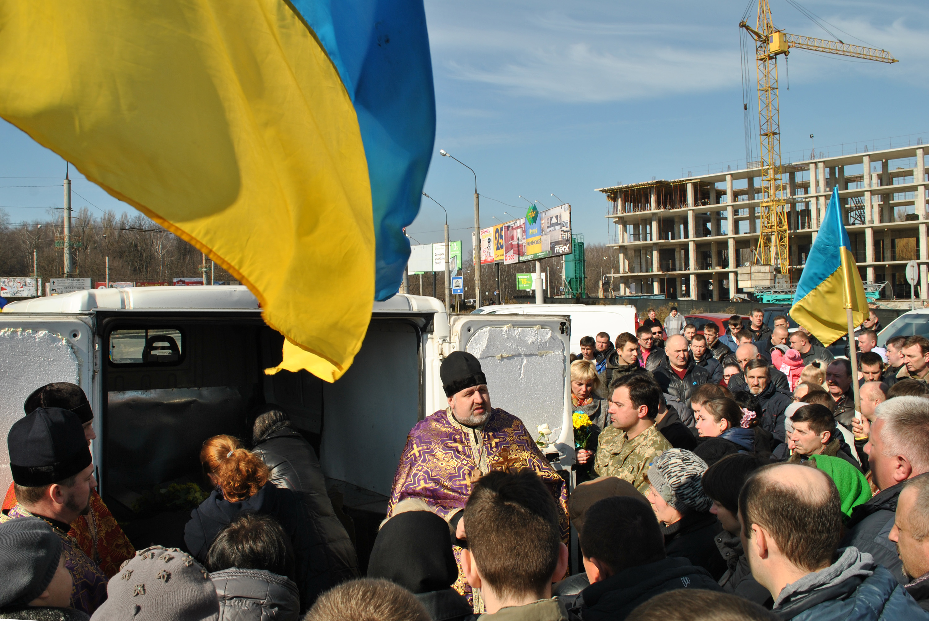 Зустріч тіла загиблого на блокпосту «Балу» під Дебальцевим старшого водія роти матеріального забезпечення 128-ї гірсько-піхотної бригади Віталія Лотоцького (8 березня 2015 року, Збаразьке кільце, м. Тернопіль).